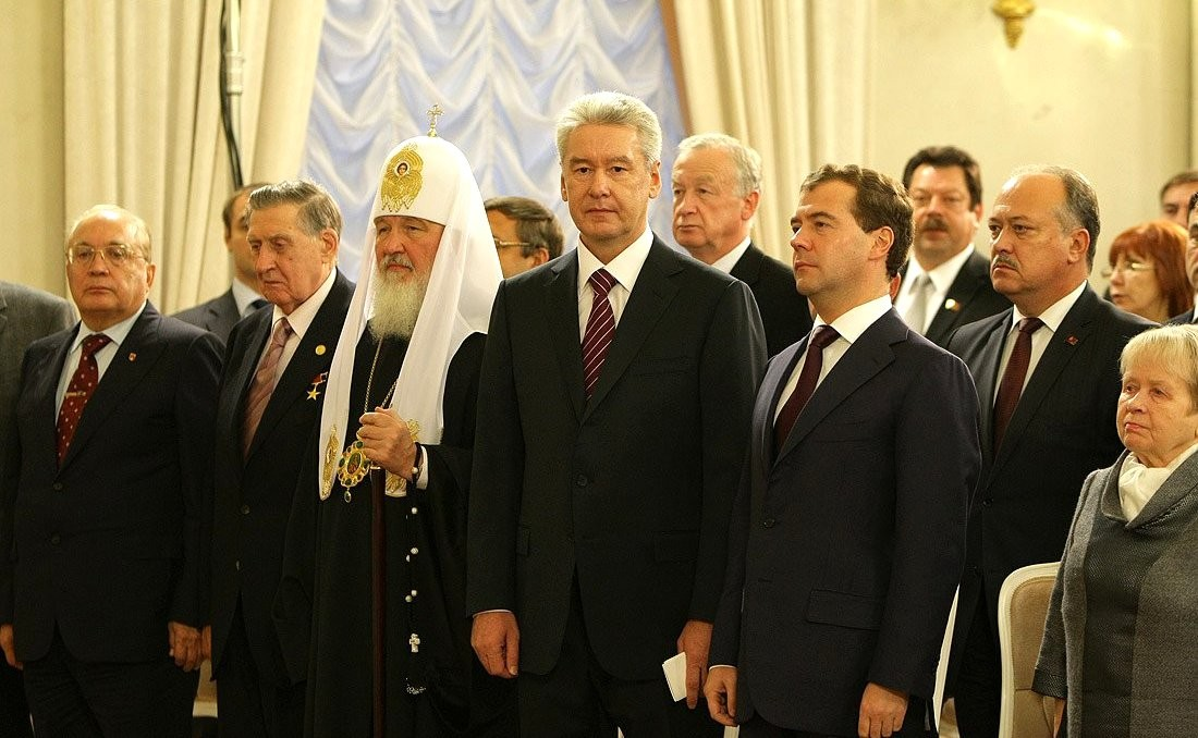 На церемонии инаугурации мэра Москвы Сергея Собянина